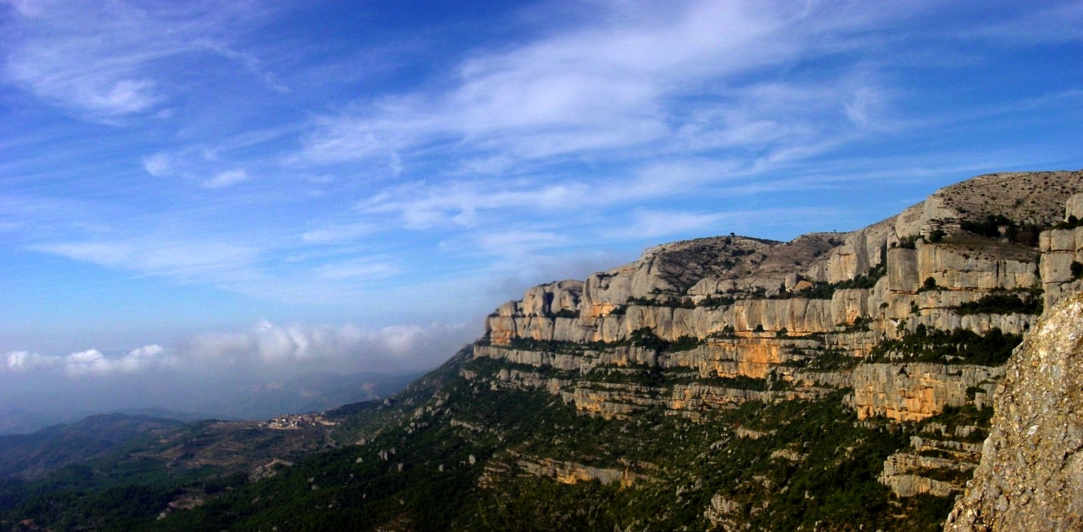 Serra del Montsant, Tarragona, vista panorámica